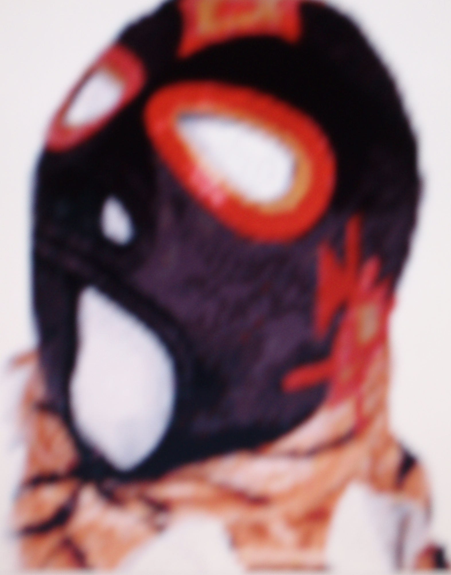 mask of konnan